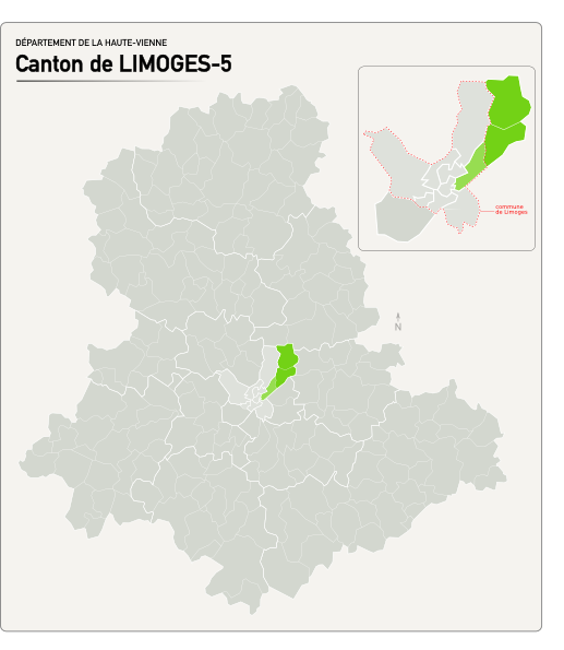 Carte du nouveau canton de Limoges-5.